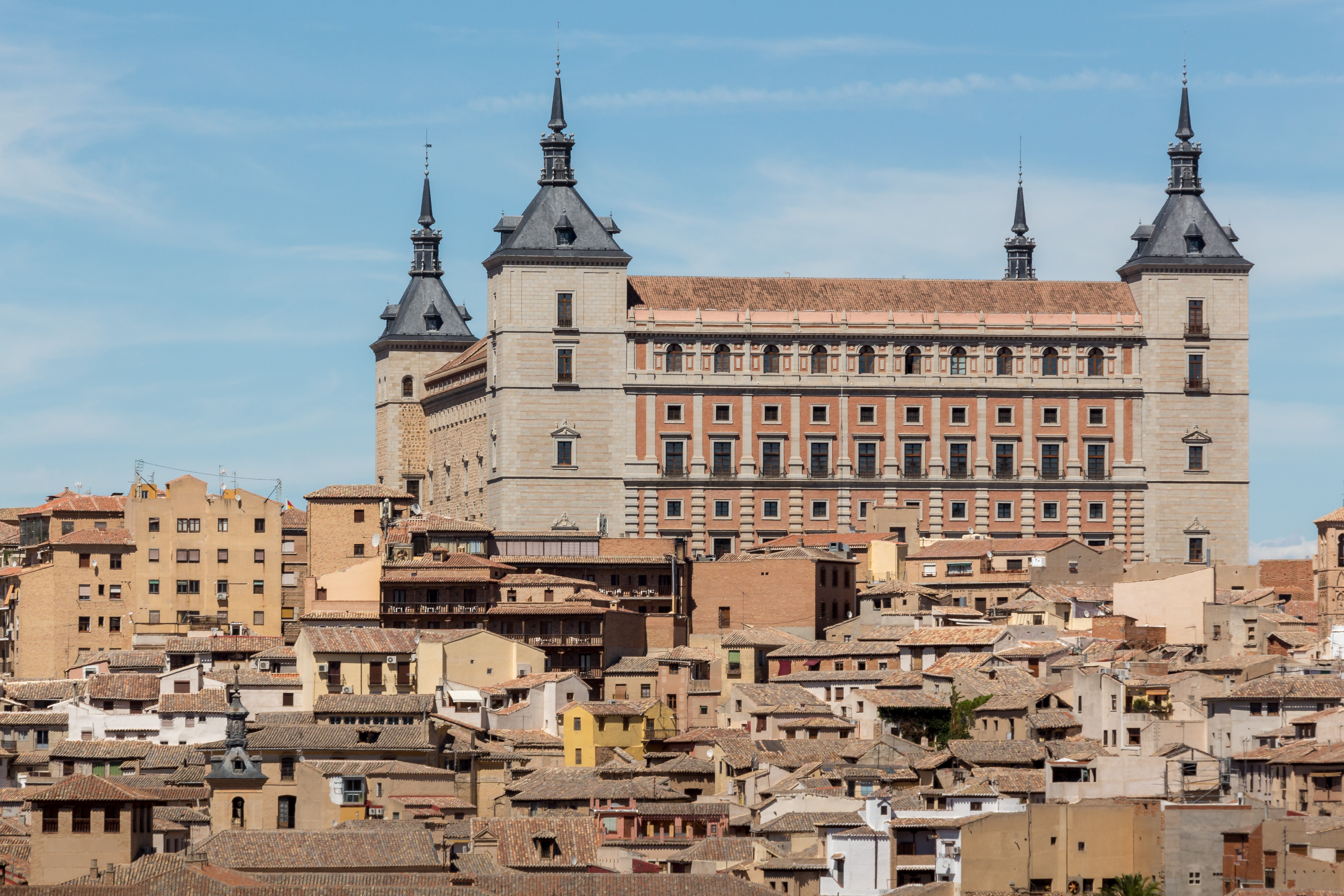 Vista del Alcázar de Toledo desde el Mirador del Valle Alcázar of Toledo Native nameAlcázar de ToledoLocationToledo (Spain)Coordinates39° 51′ 29″ N, 4° 01′ 14″ W EstablishedMiddle AgeAuthority control : Q1326589 VIAF: 305243040 LCCN: sh85003257 BIC: RI-51-0001095 GND: 4443660-9 BNE: XX150561 WorldCat institution QS:P195,Q1326589